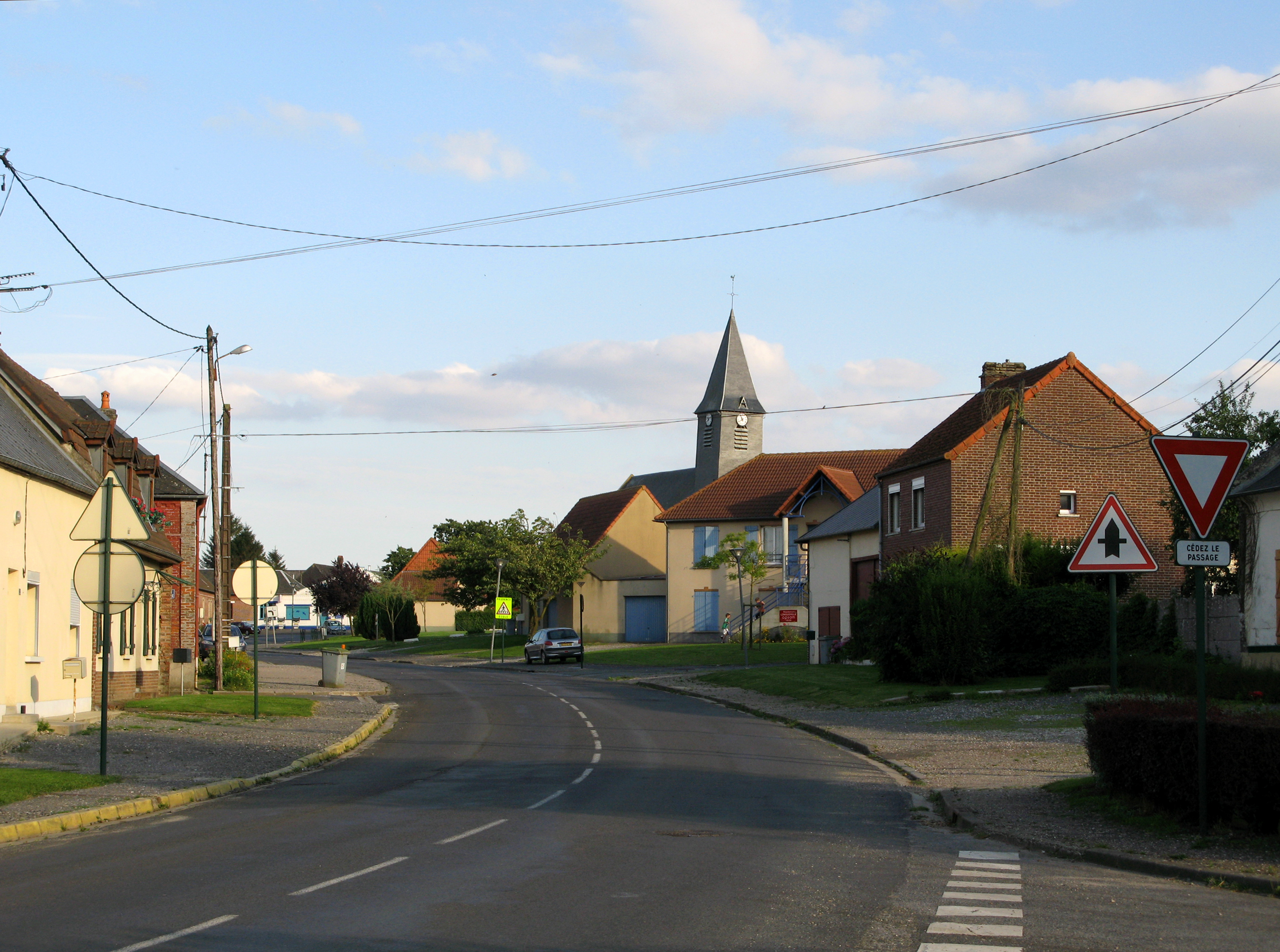 Candas (Somme, France) - Peu après l'entrée dans le village depuis la rue venant du moulin.